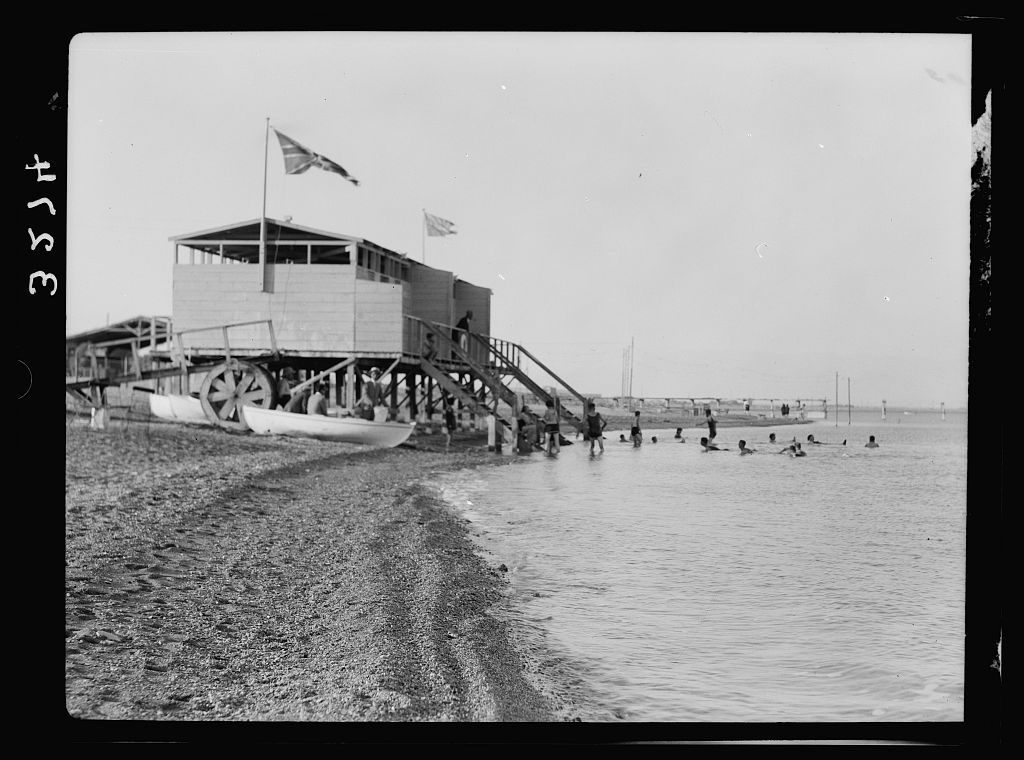 ים המלח, חוף קליה 1920